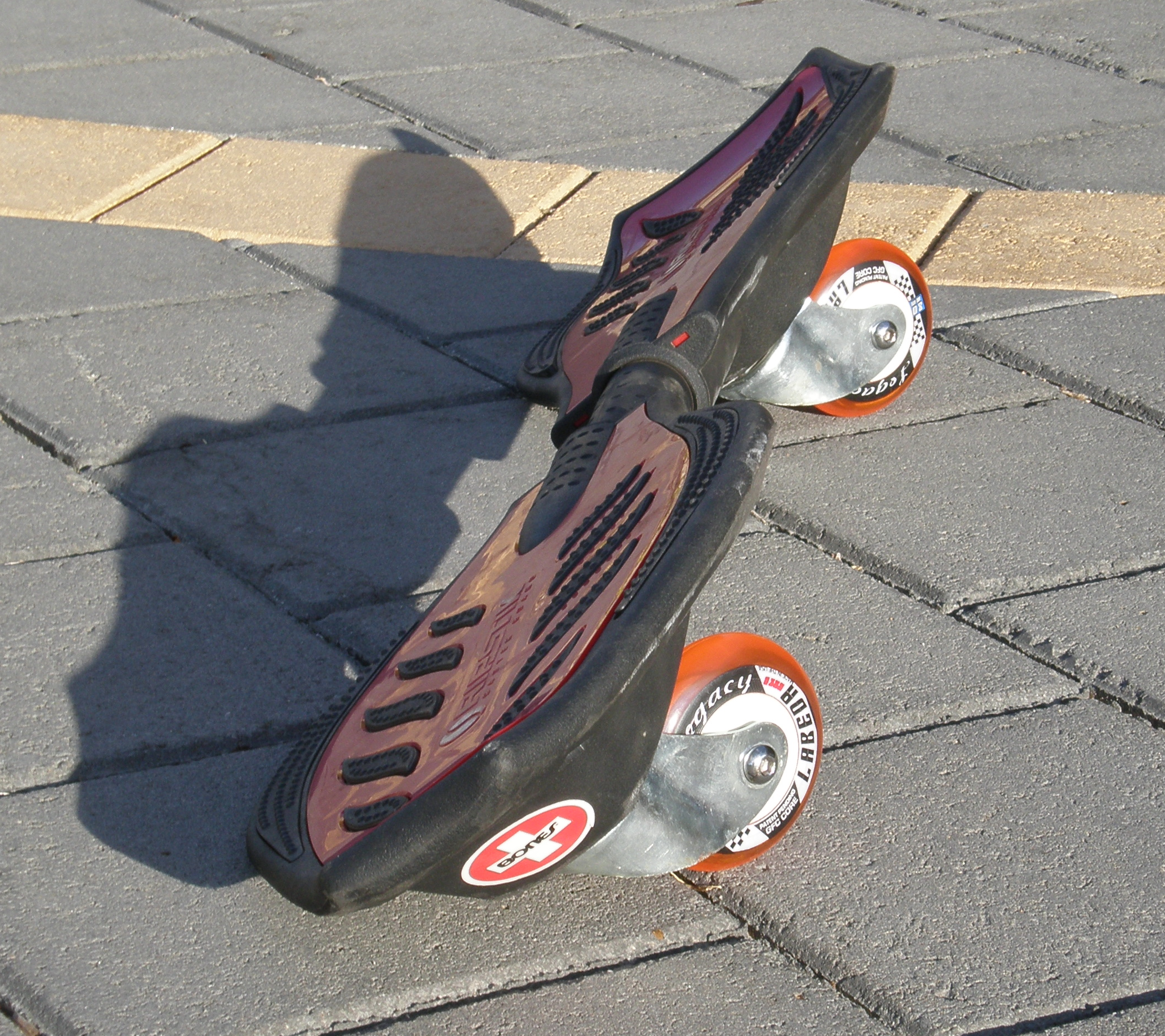 Photo d'une Rip Stick